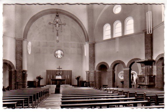 St. Augustinus (Nordhorn), Innenraum weiß getüncht mit Übermalung der Kuppel und der Fresken und Austausch der Buntglasfenster